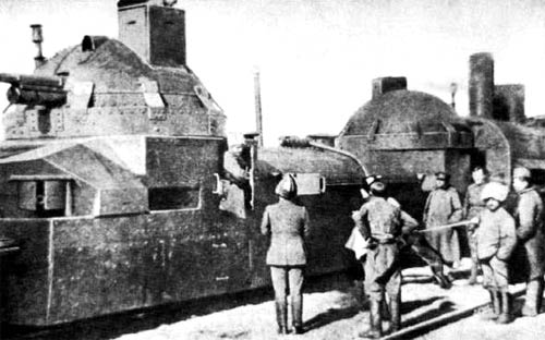 «Orlik» Бронепоезд «Орлик» (Русская армия, Бело-чехи, Дальне-восточная армия)